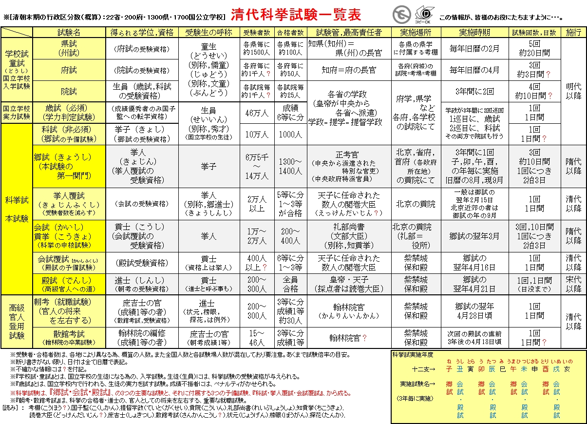 清代の科挙試験（科挙制度）の一覧表です。よろしくお願いします。